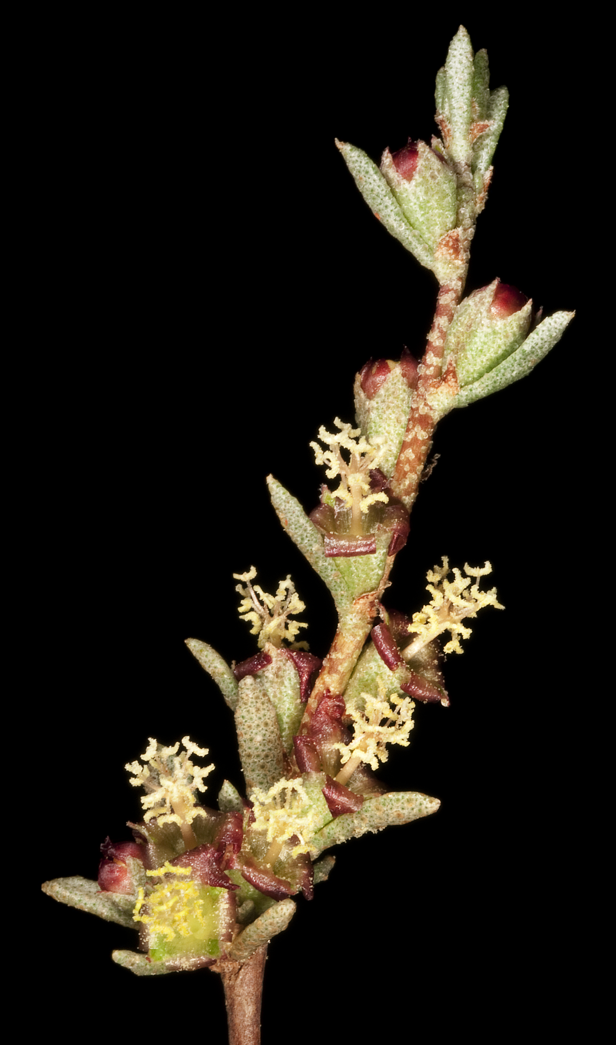 KRT4629